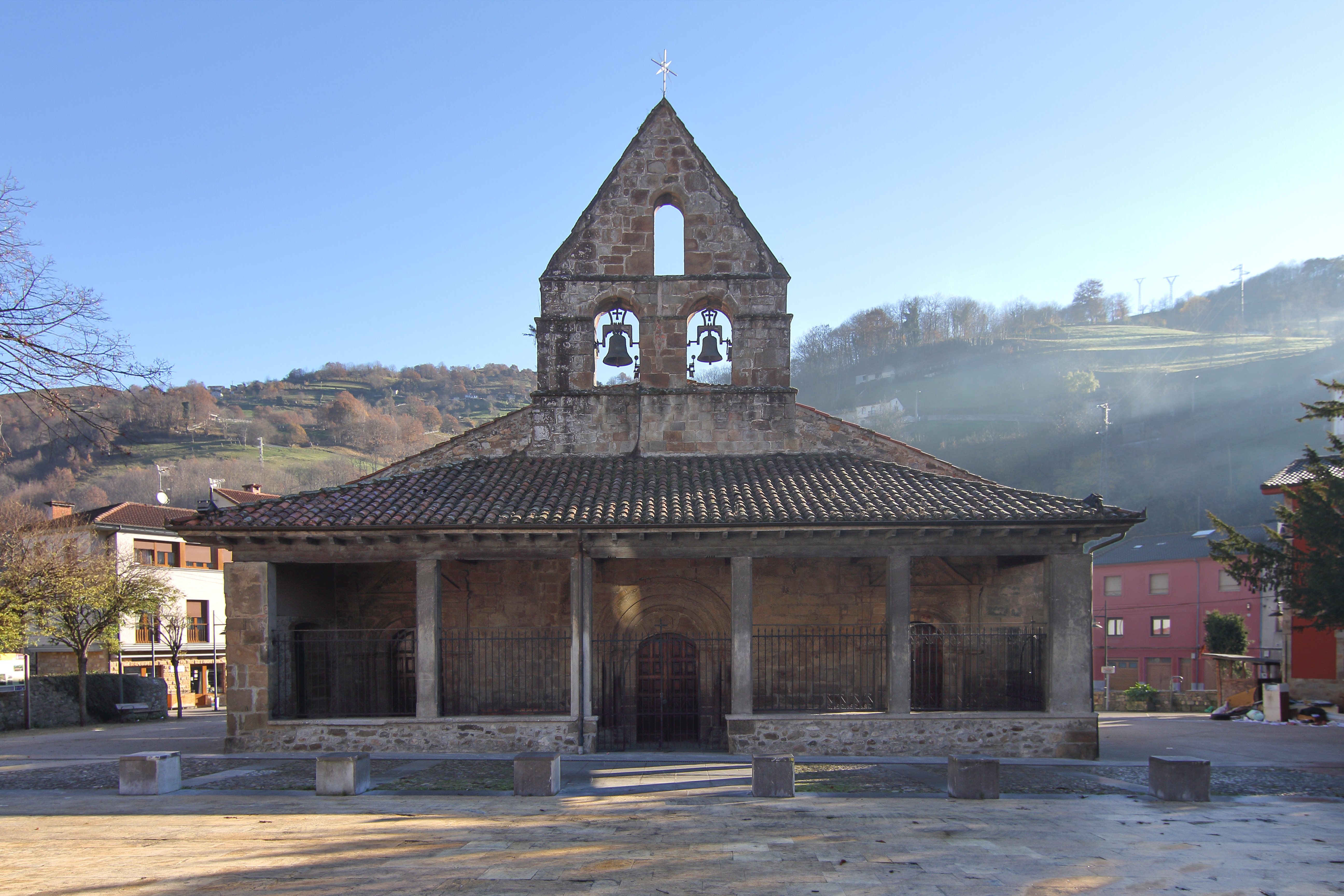 Iglesia de San Nicolás, en Villoria (Laviana), 1